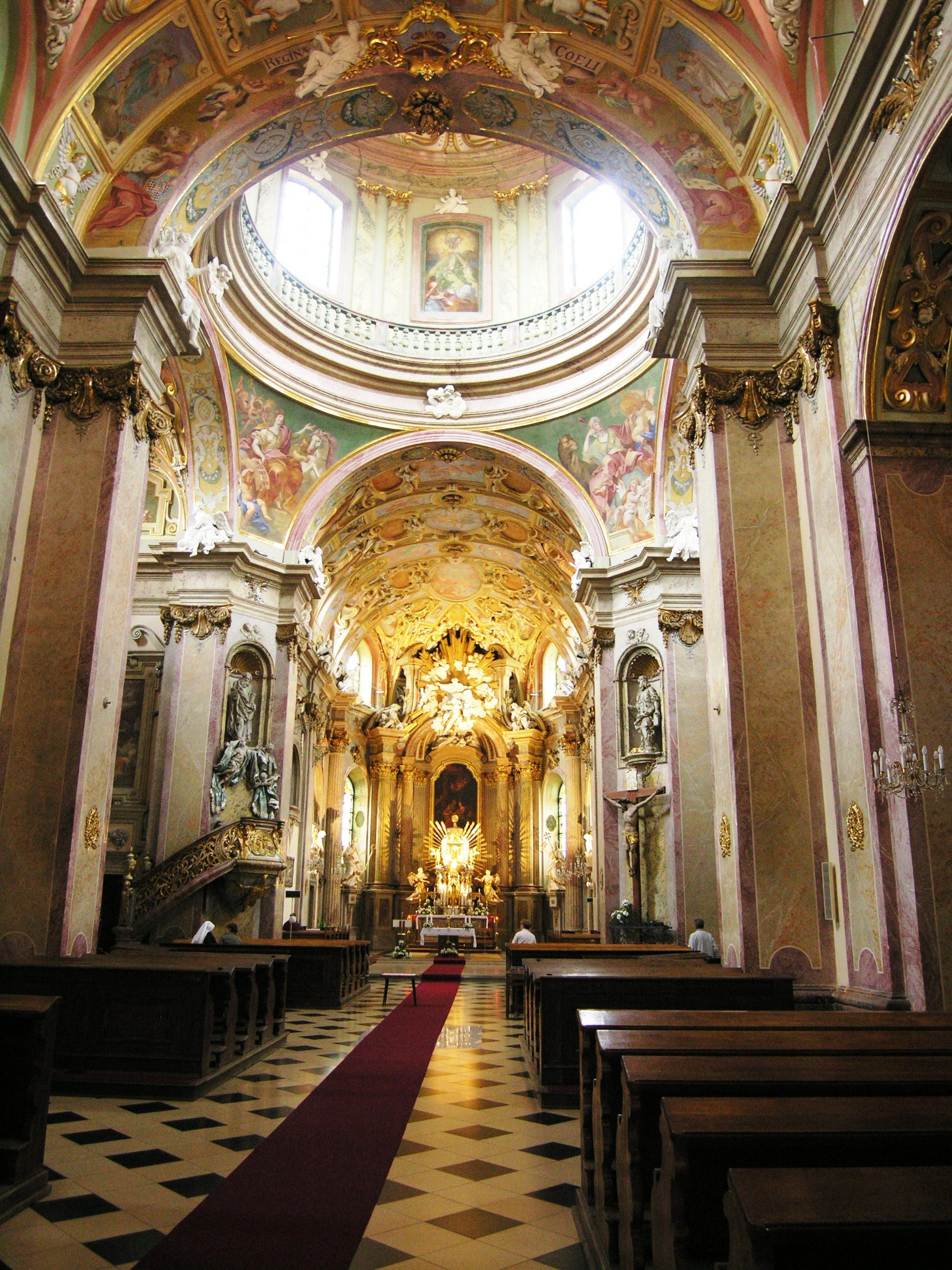 Kostel Navštívení P. Marie (Svatý Kopeček), Svatý Kopeček